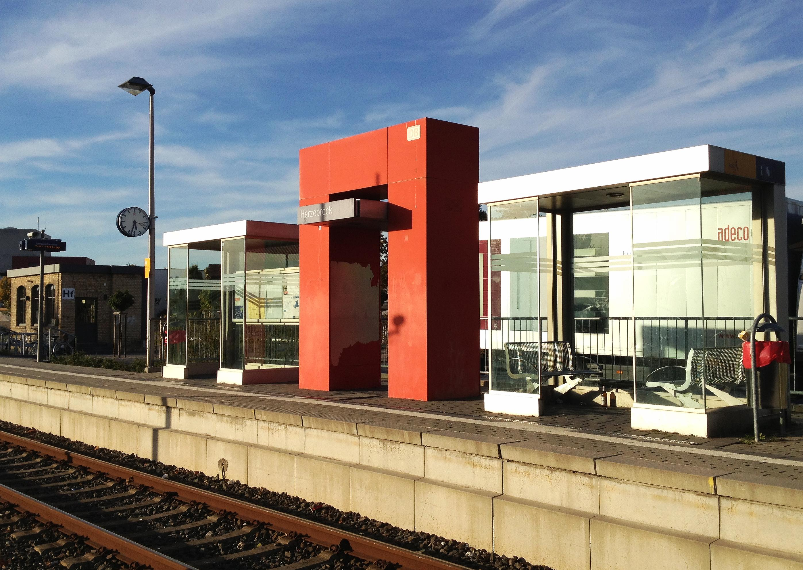 Bahnhof Herzebrock, links: altes Stellwerk